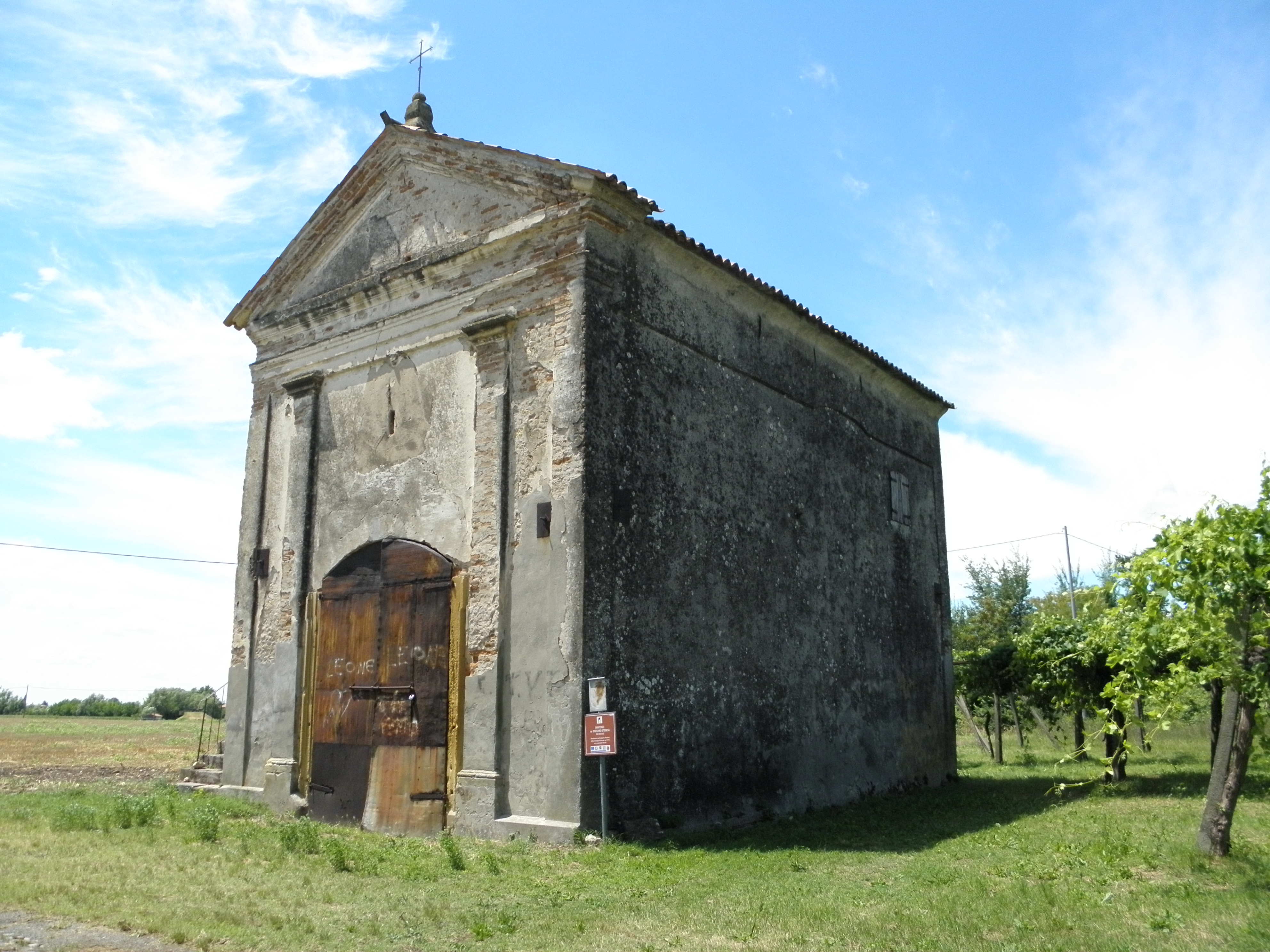 Orgiano, il settecentesco oratorio dei Santi Gregorio e Teresa in via Ca' Muzzana, nei pressi dell'abitato. Realizzato su iniziativa di Gregorio Piovino, della famiglia Piovene, nel 1714.